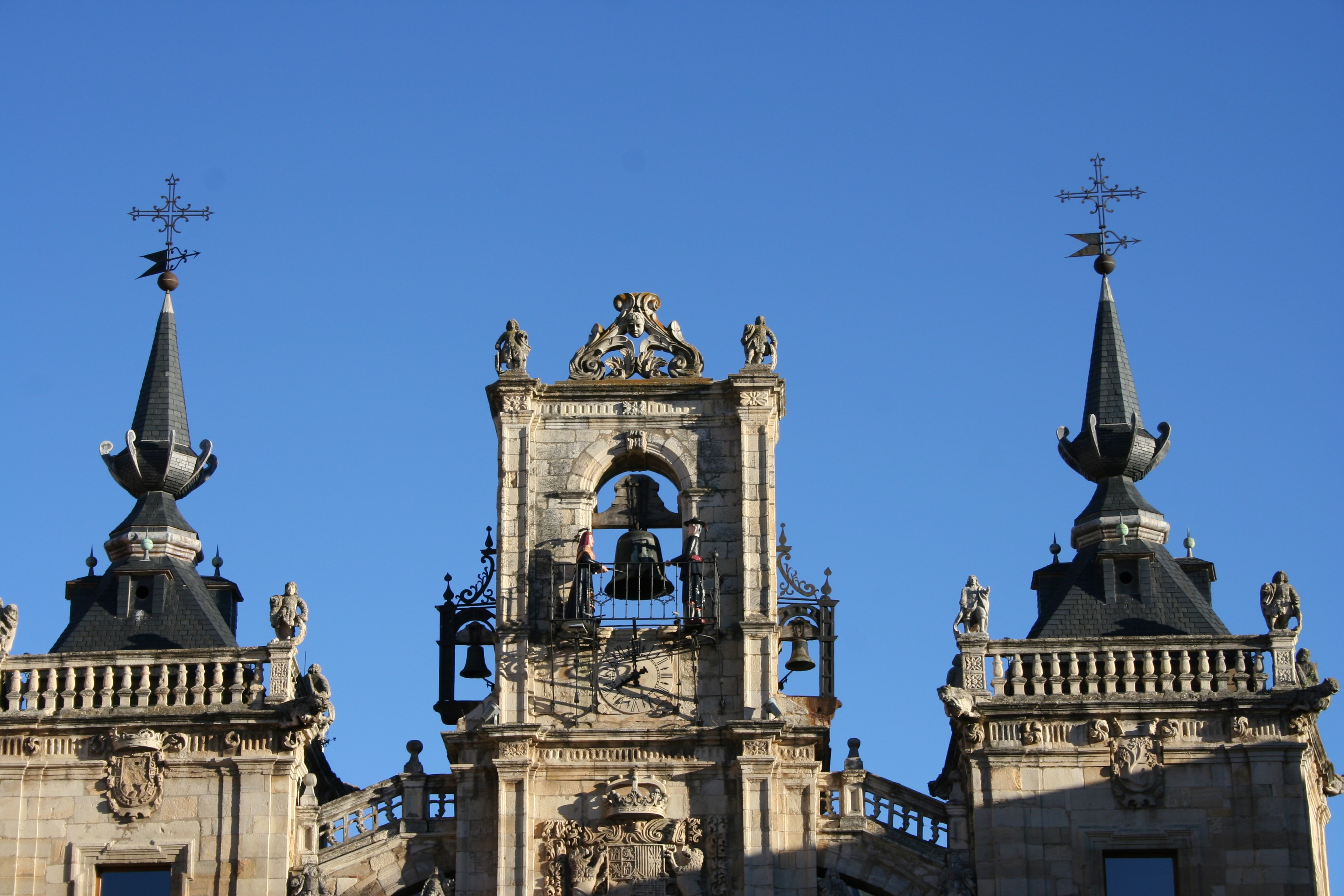 Campanario del ayuntamiento con el reloj de los maragatos